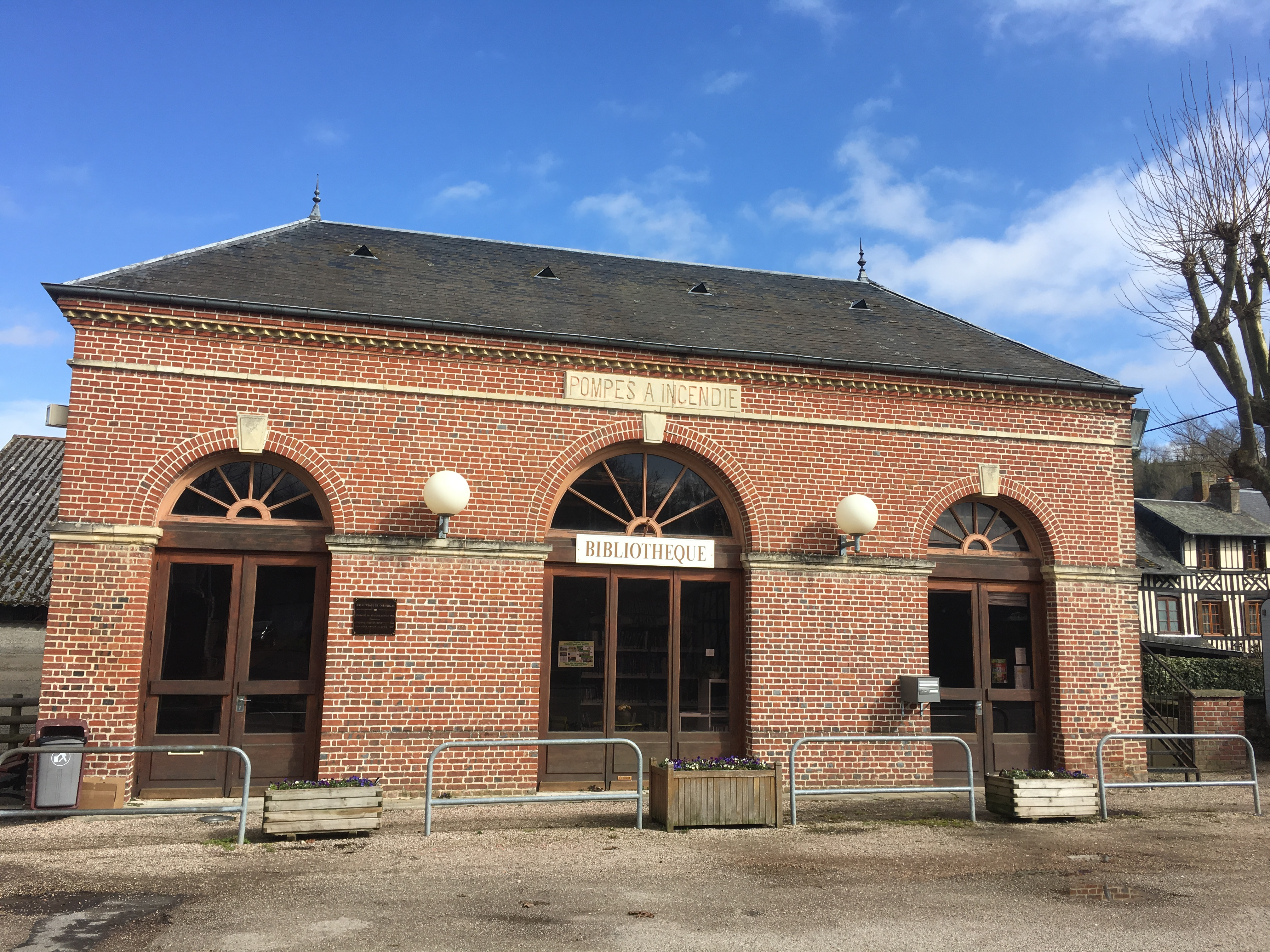 Cormeilles Eure bibliothèque